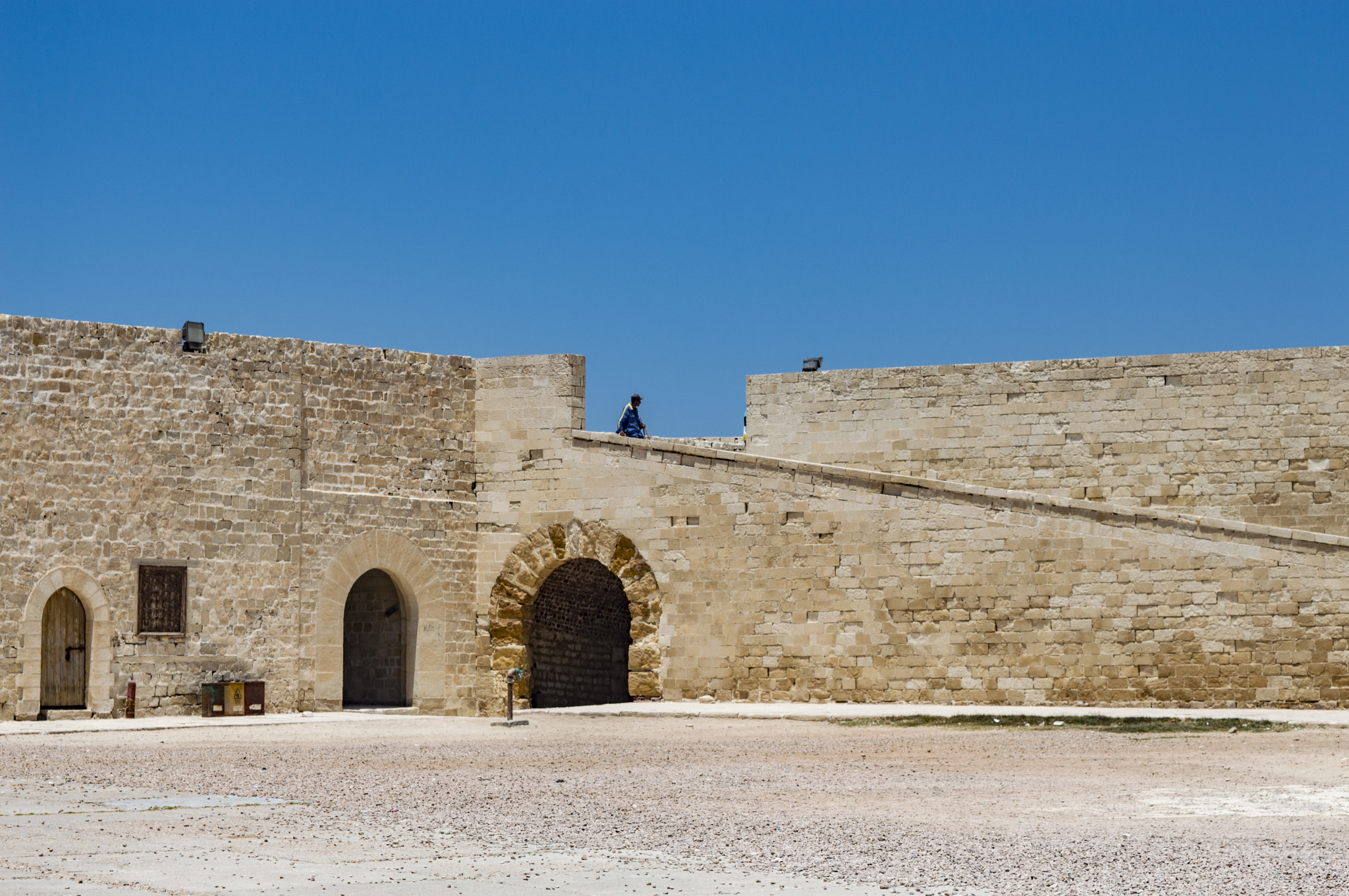 500px provided description: Alexandria Egypt [#Africa ,#Egypt ,#Alexandria]